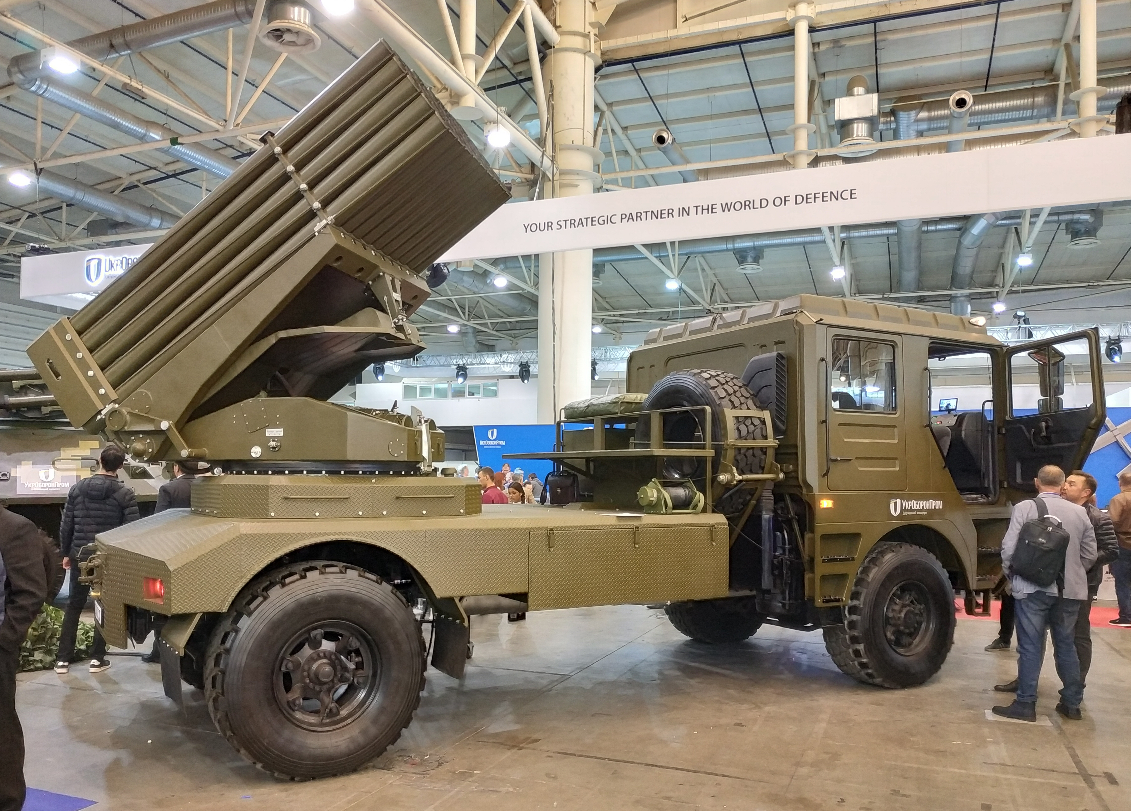 Реактивная система залпового огня БМ-21УМ "Берест" в экспозиции Шепетовского ремонтного завода. Выставка "Зброя та безпека", Киев, октябрь 2018 г.